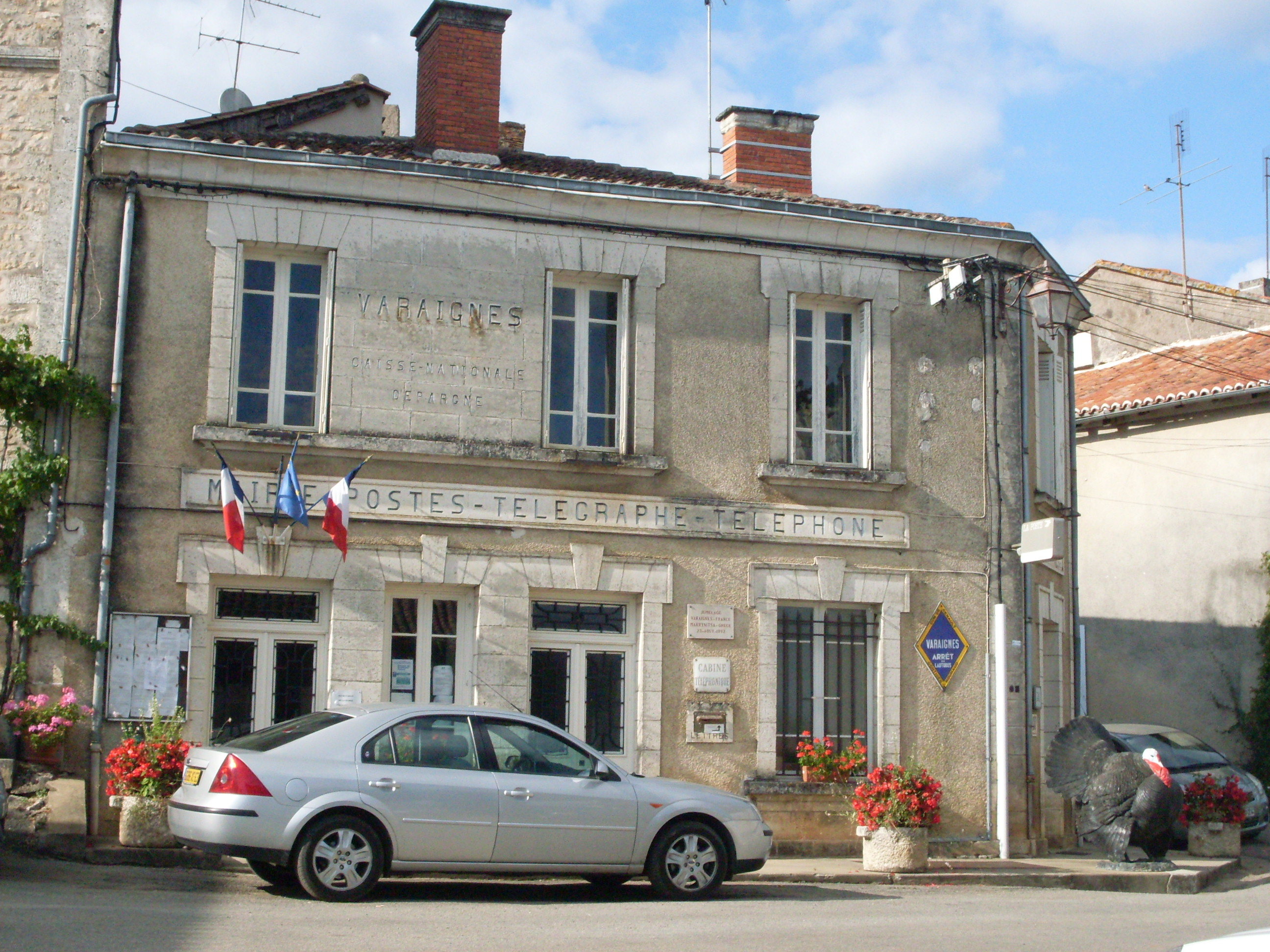 Mairie et bureau de poste de Varaigne, Dordogne, France